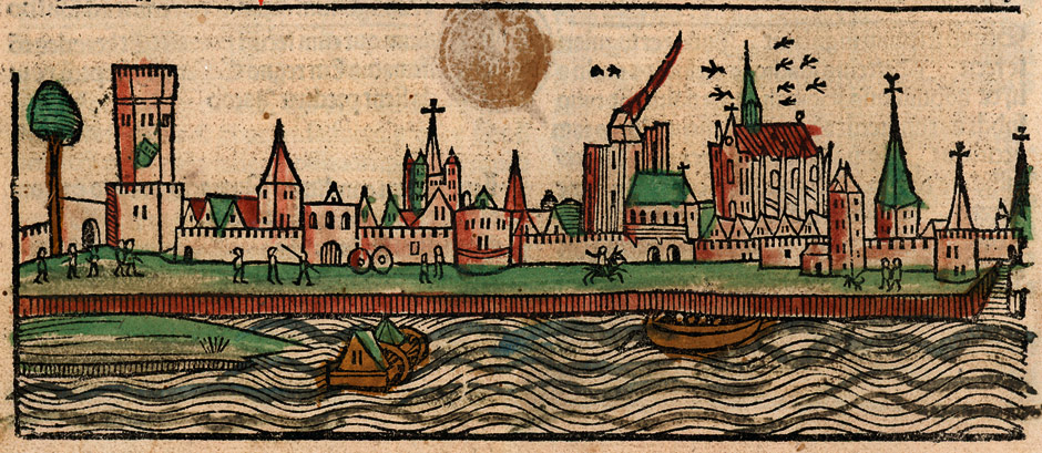 aus: Werner Rolevinck: Fasciculus temporum, Köln, Ludwig von Renchen